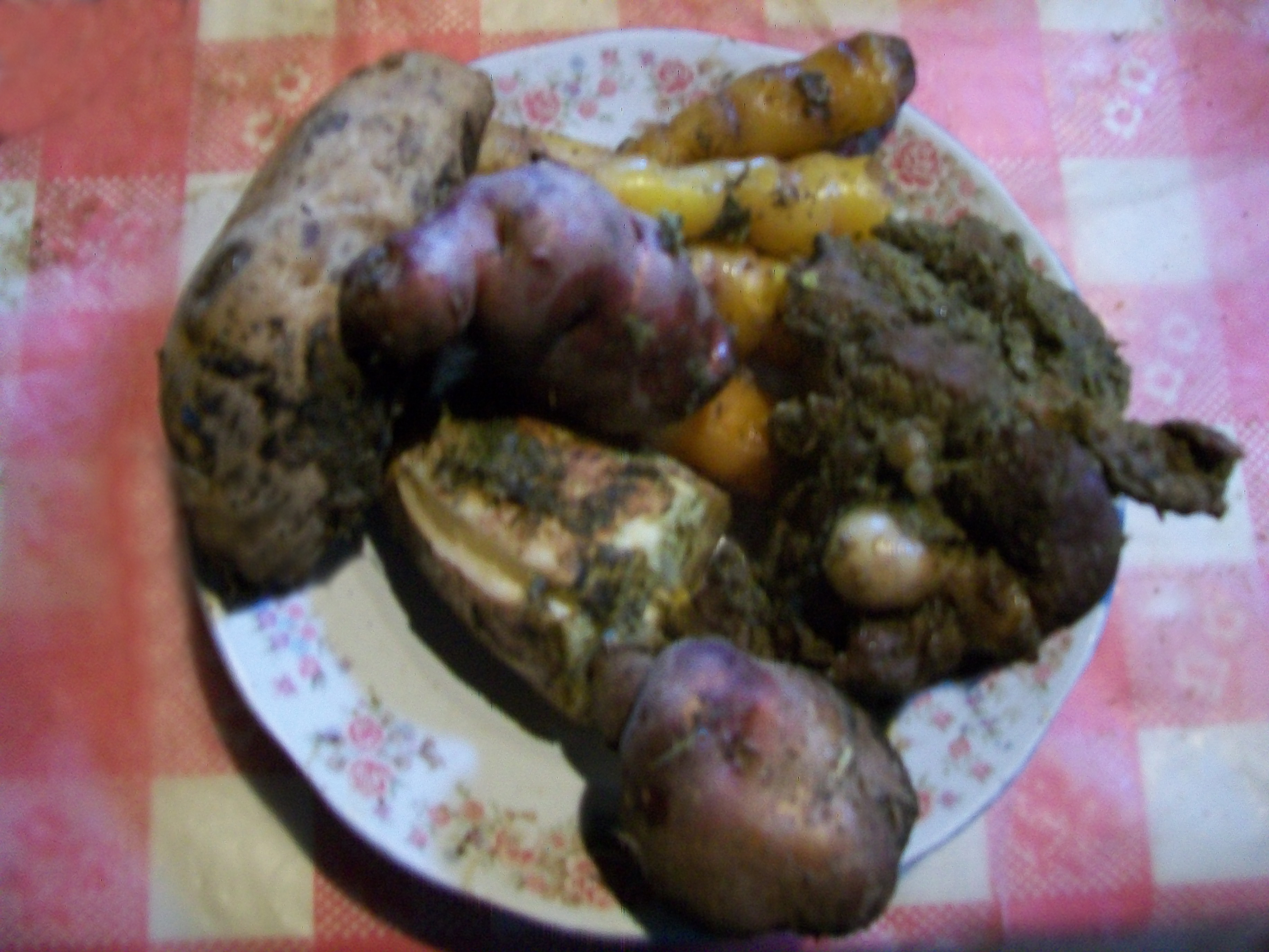 Pachamanca como potaje andino. País : Perú Fotógrafo:© Edgar Amador Espinoza Montesinos